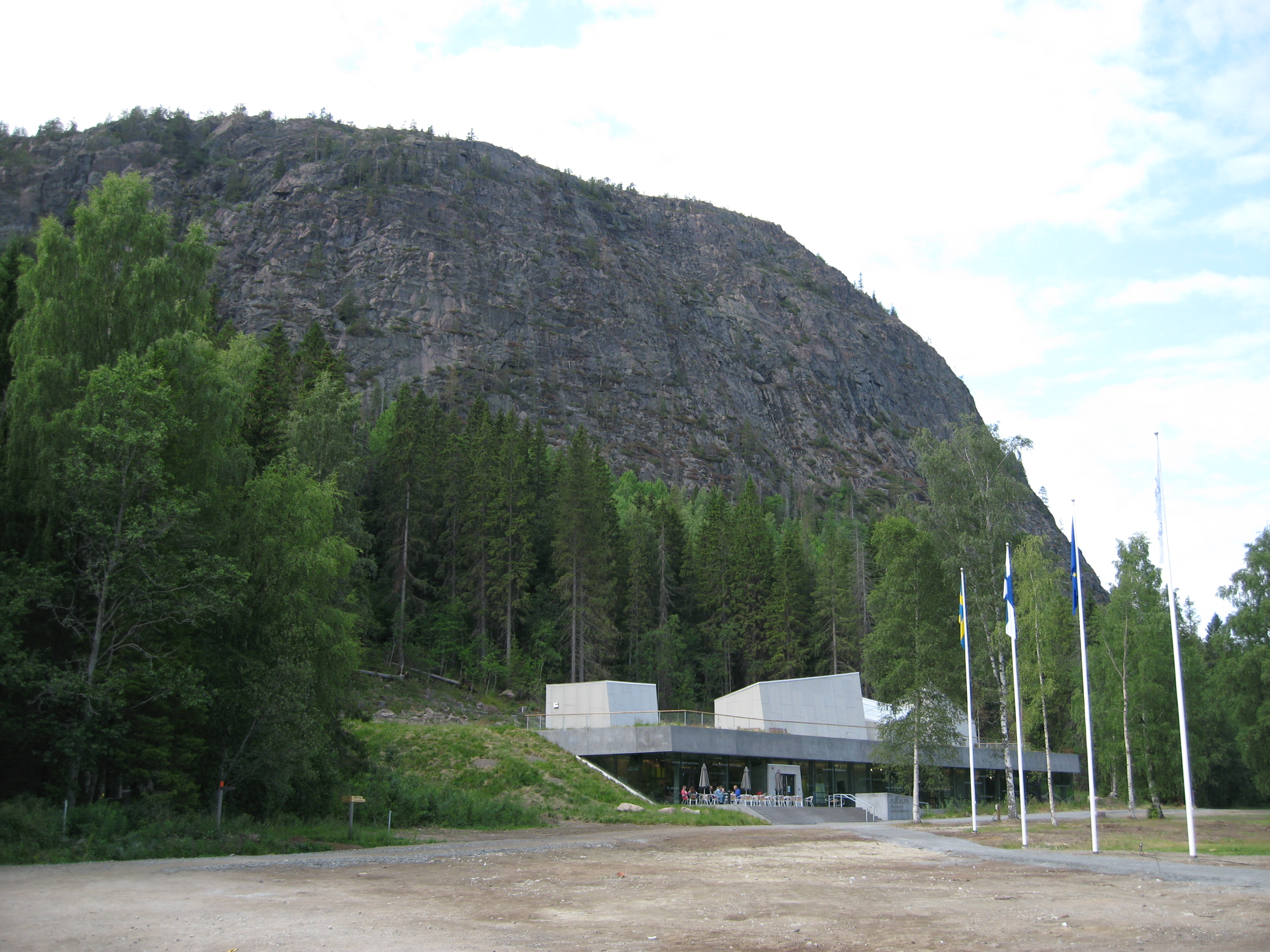 Skuleberget med Naturum i förgrunden